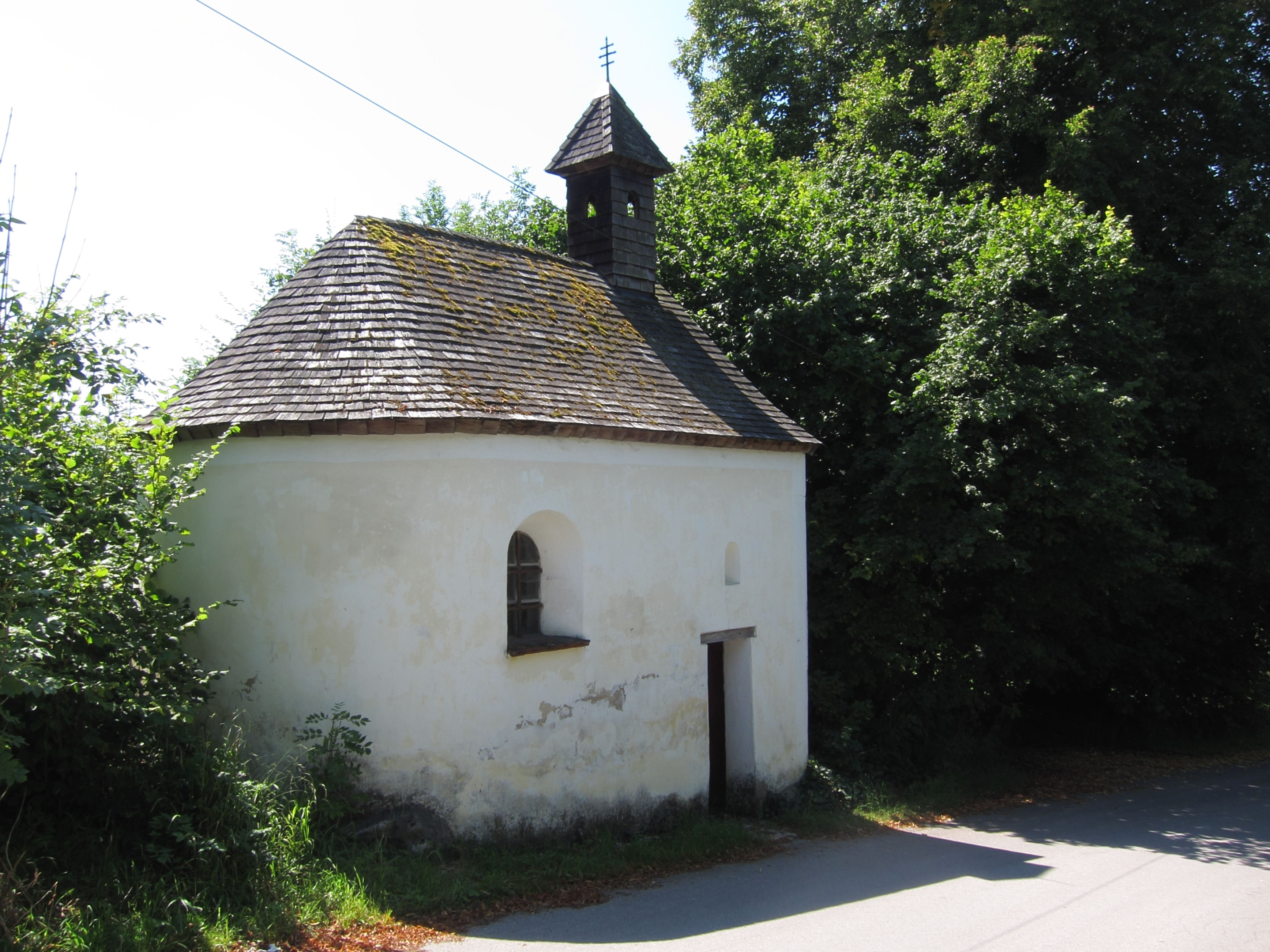 Marienkapelle; kleiner halbrund geschlossener Putzbau mit Dachreiter, 17.-19. Jh.; mit Ausstattung.